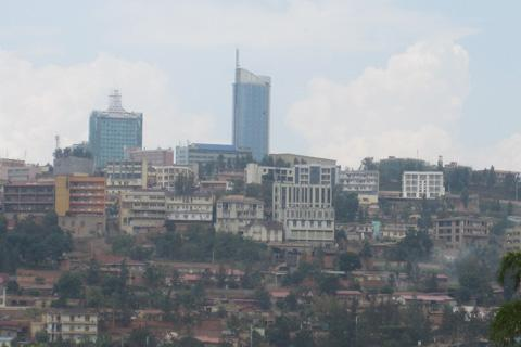 Une vue de la ville de Kigali (septembre 2011)